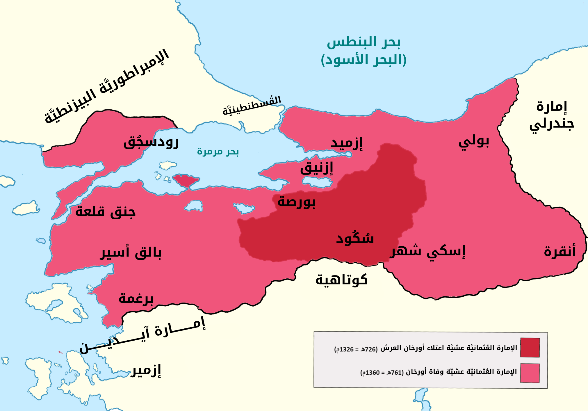 خارطة تُبيِّن حُدود الإمارة العُثمانيَّة في بداية عهد أورخان الغازي وعند نهايته.